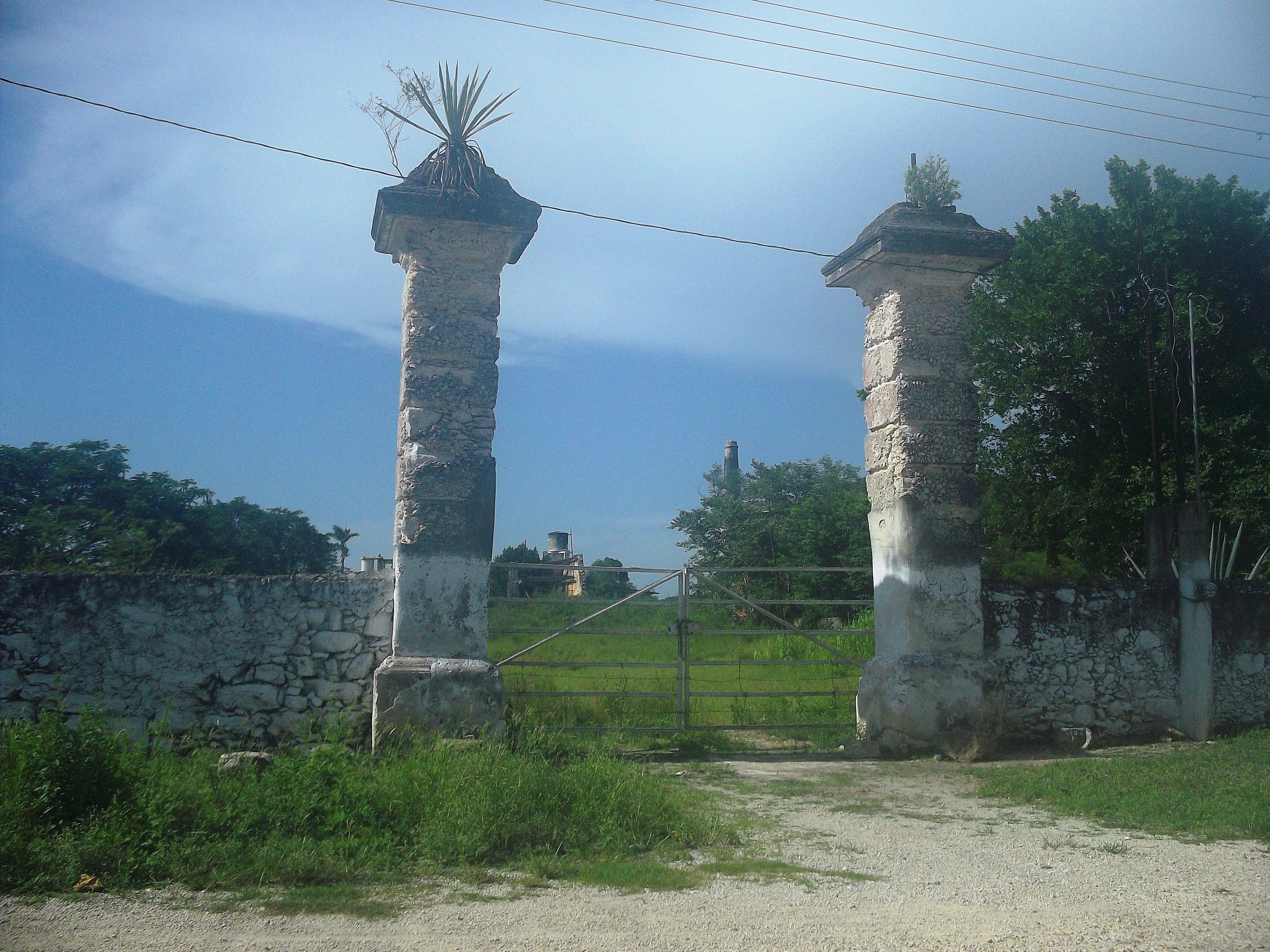 Entrada a la hacienda de San Antonio Xiat, Yucatán.